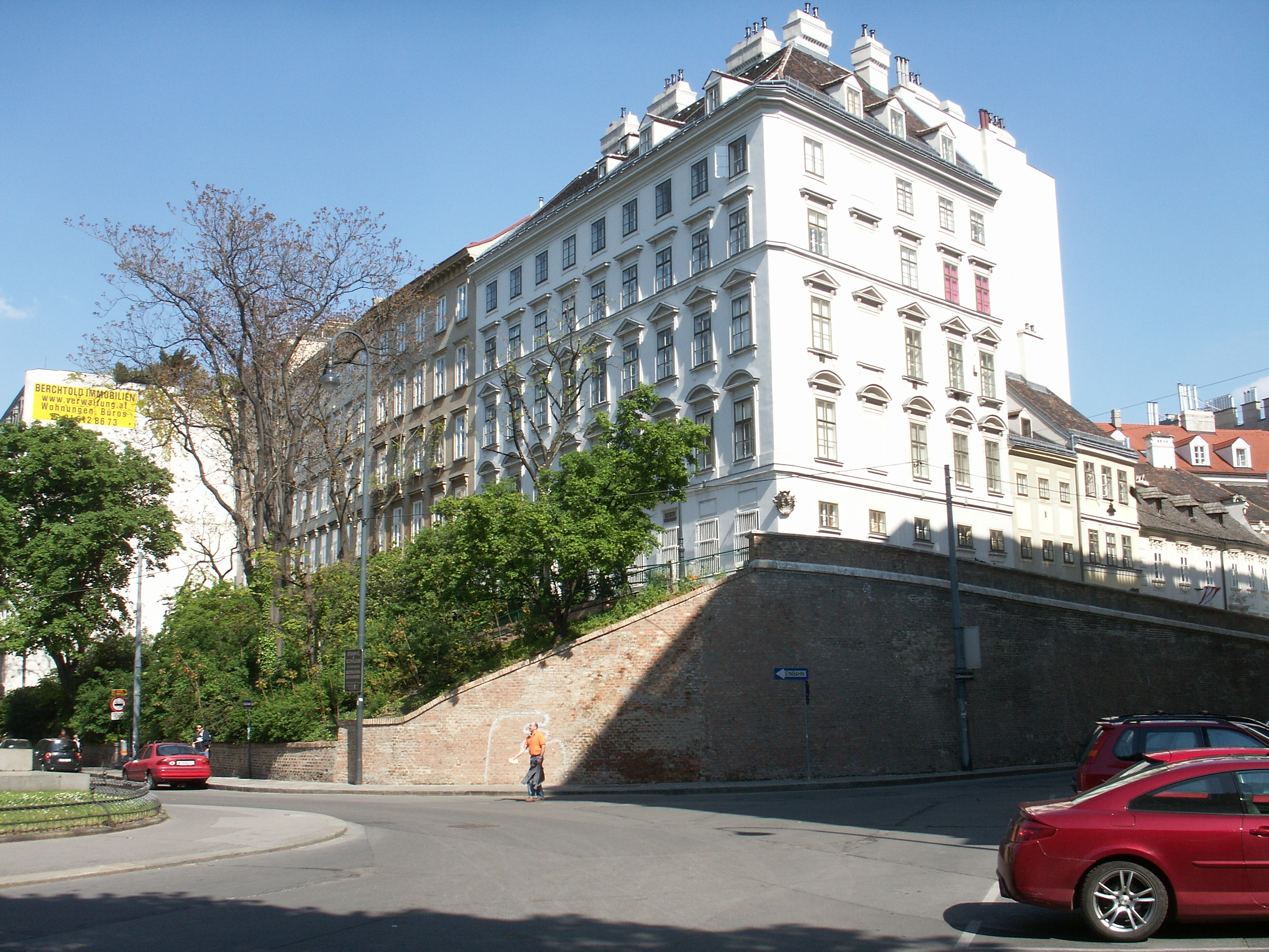 Mölker Bastei mit Pasqualatihaus, Wien, (Beethoven 1804 - 1808 und 1810 - 1814).